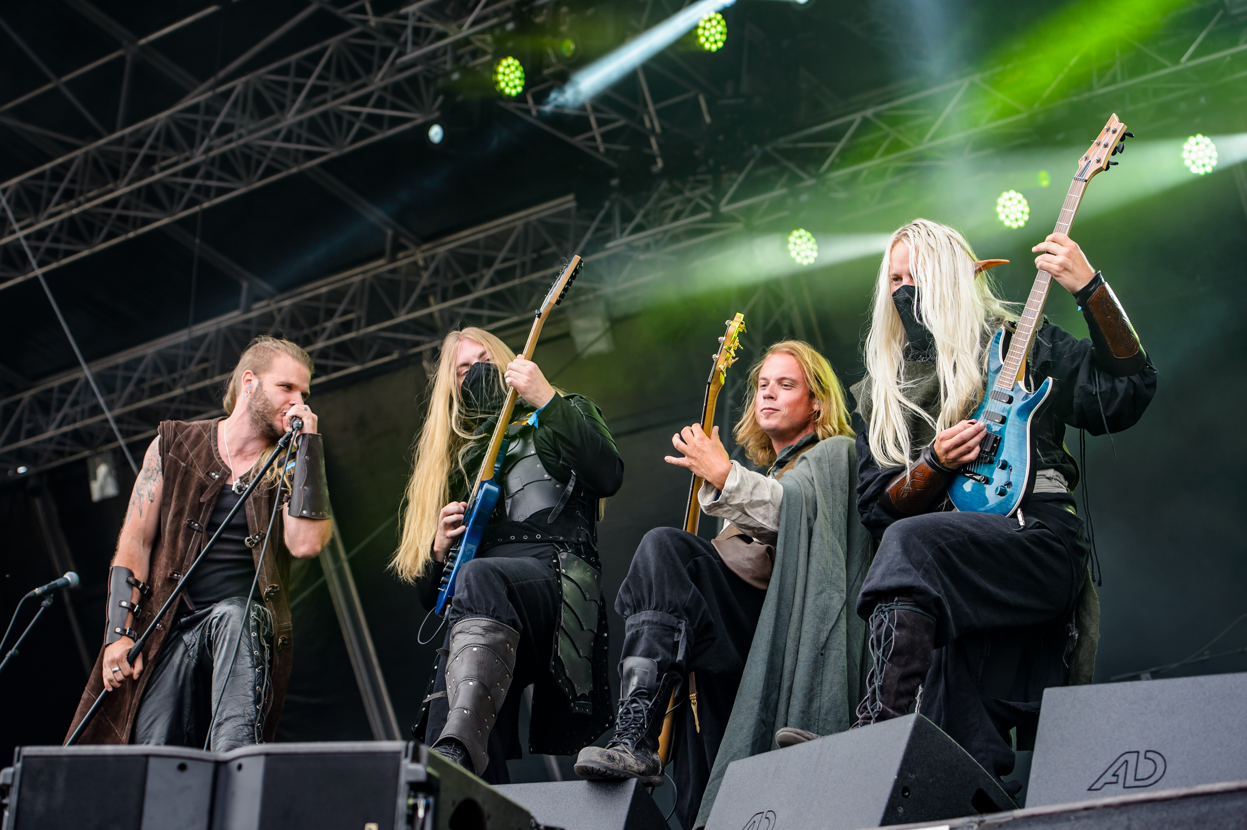 'RockHarz Open Air 2016; Ballenstedt': 'Twilight Force'